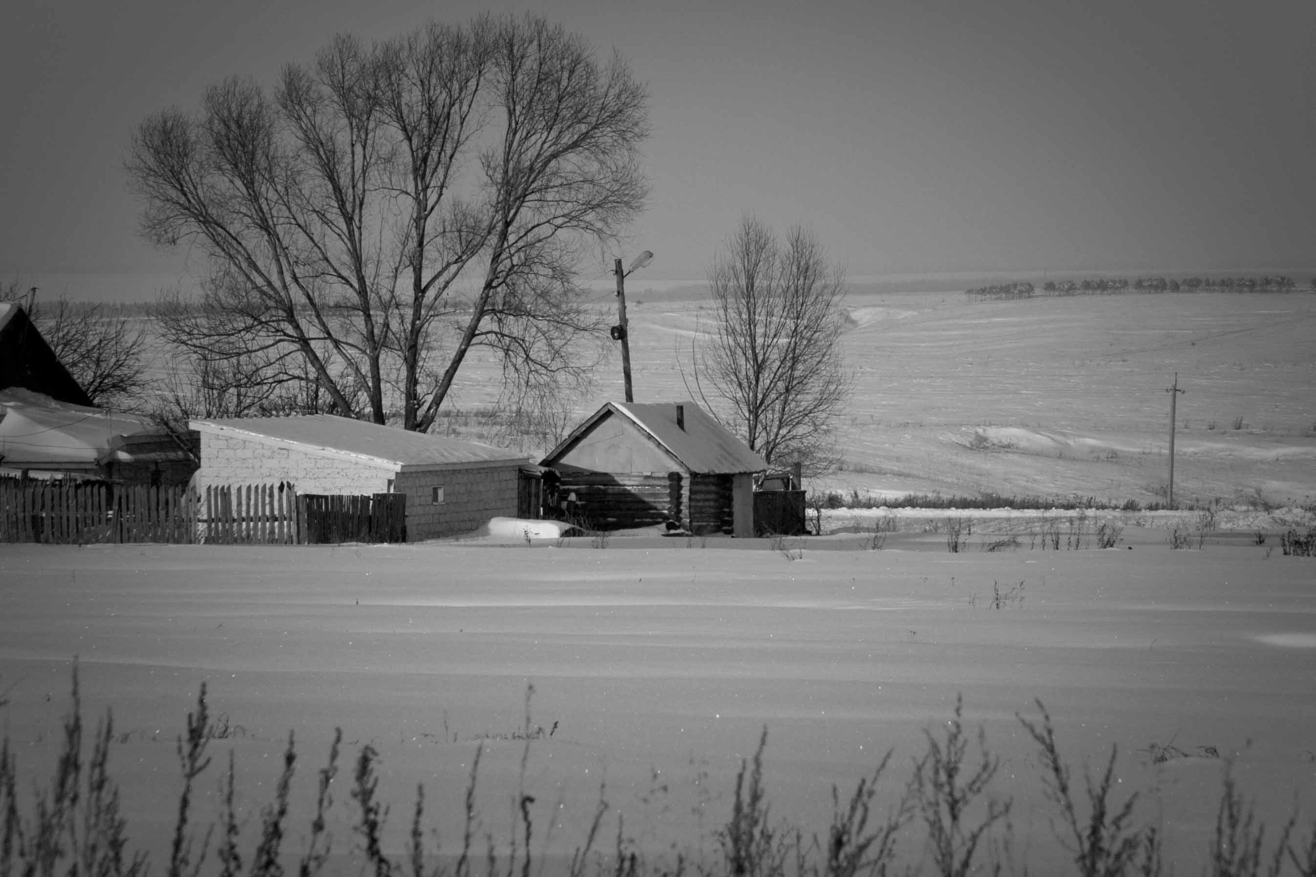 Базлово